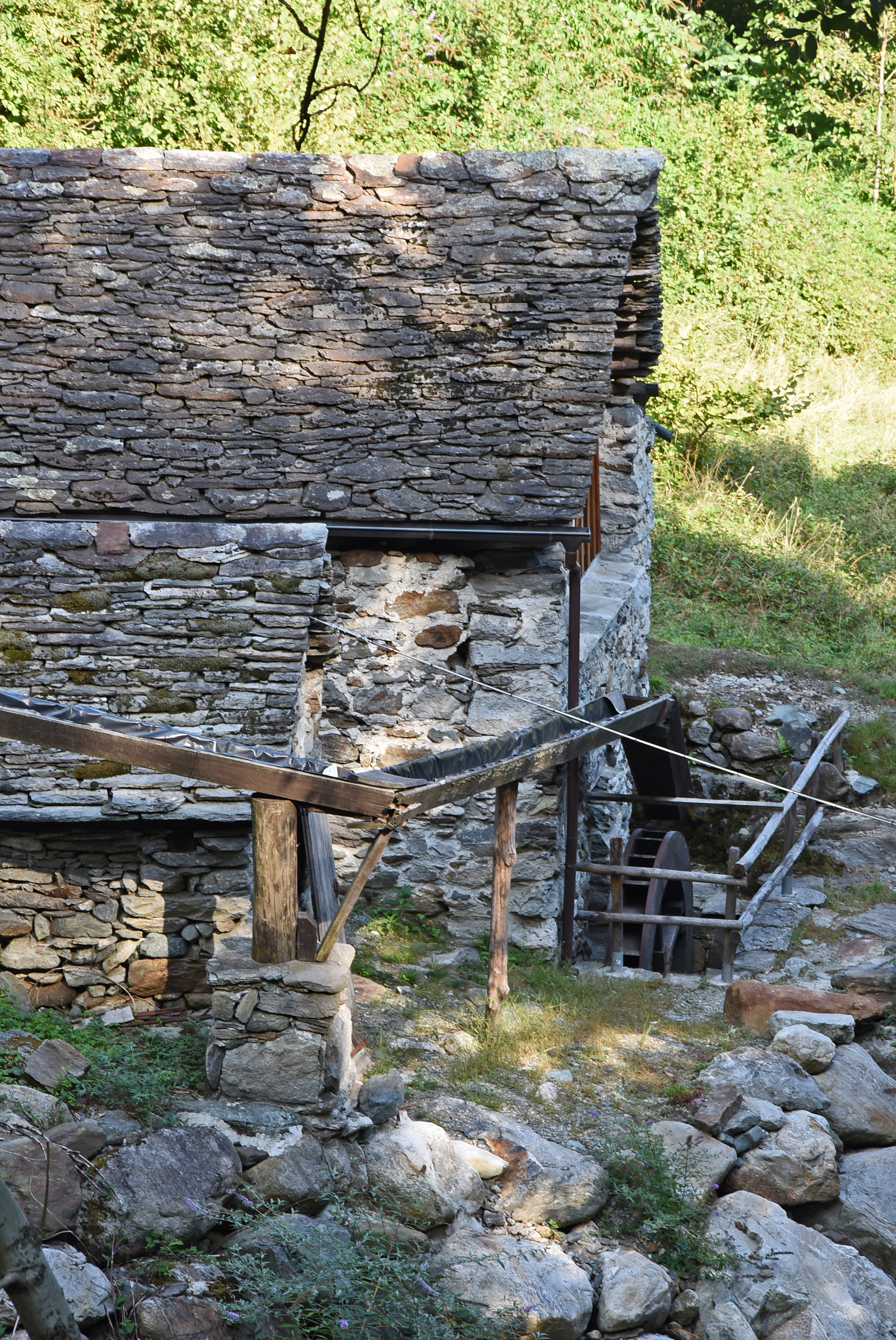 Mulino di Roletto This is a photo of a monument which is part of cultural heritage of Italy.